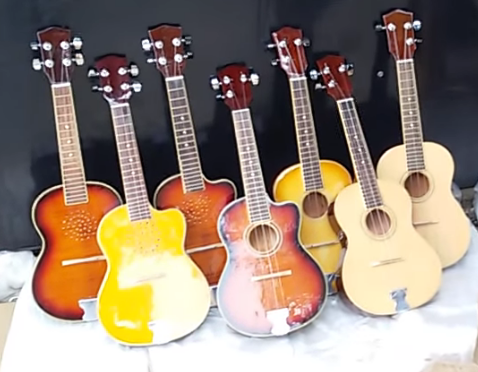 ĉakoj kaj ĉukoj.